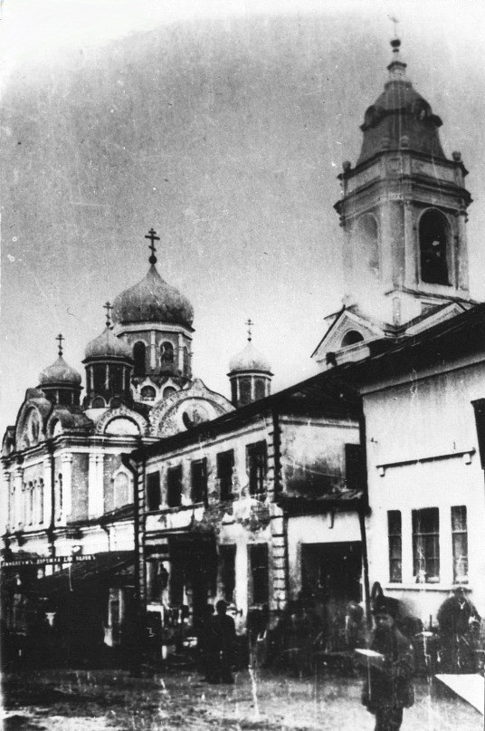 Вид на церковь Архангела Михаила с улицы Архангельской (ныне Свердлова) в Ельце. Фото начала XX века.